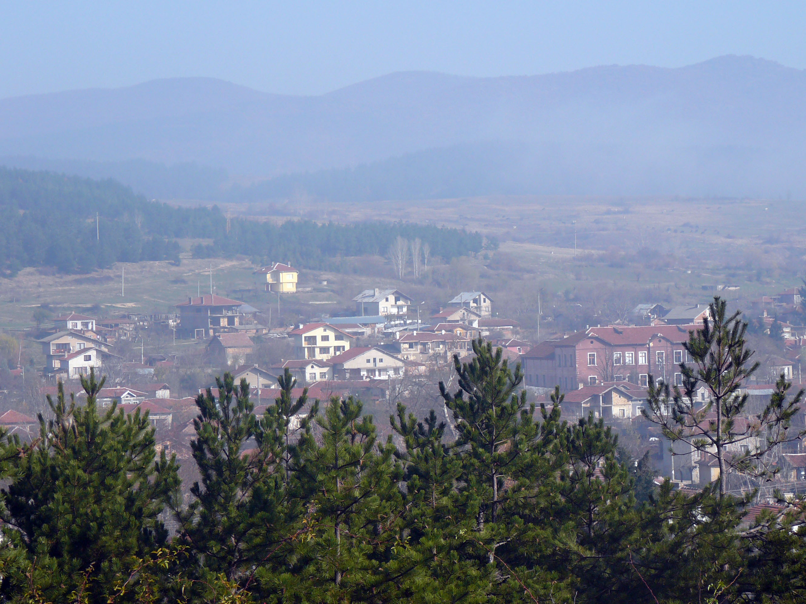 Lesichevo-Bulgaria